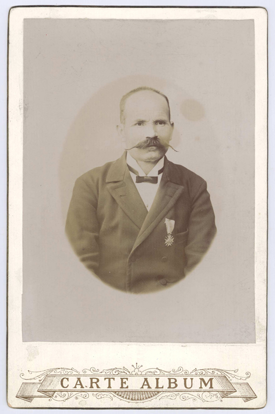 Атанас Свещаров, български революционер, Ботев четник